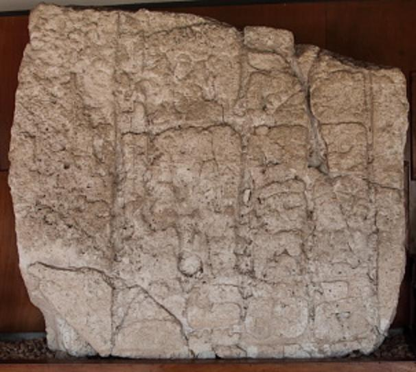 Estela proveniente de la zona arqueológica maya de Santa Elena, municipio de Balancán, estado de Tabasco, México.